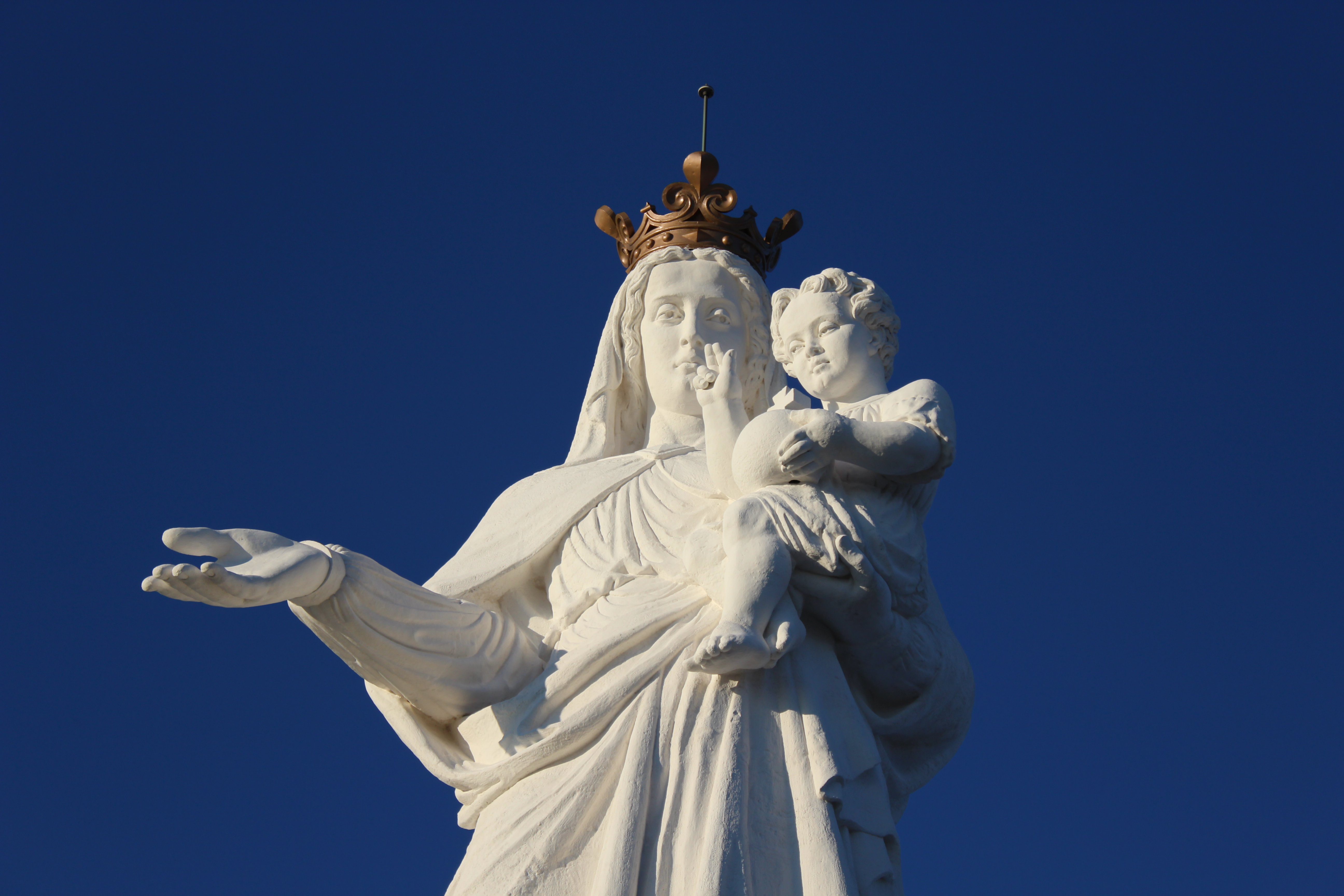 Vierge de Monton (Puy-de-Dôme, Auvergne, France)